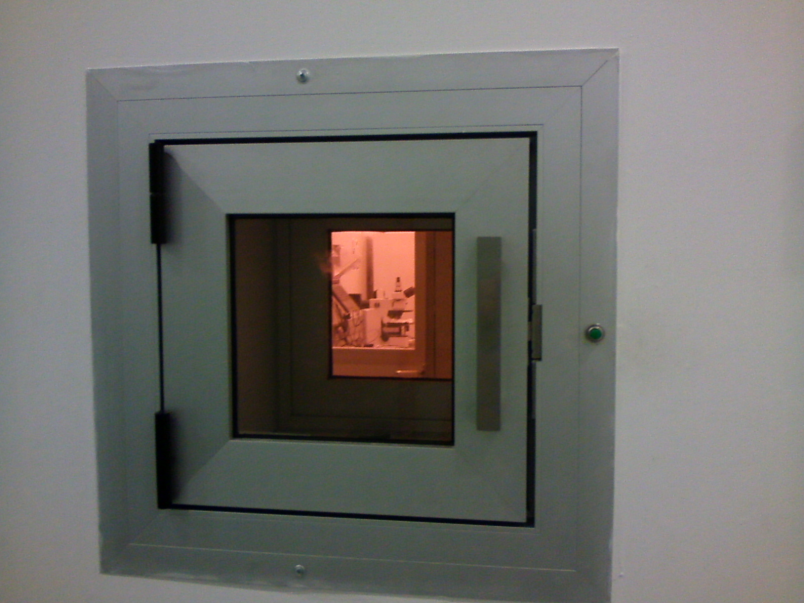 חלון קטן המאפשר העברת דברים בין העולם החיצון, למנעל אוויר